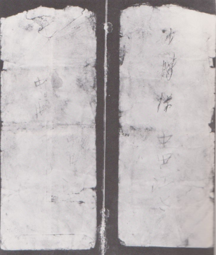 狭山事件の脅迫状の封筒。